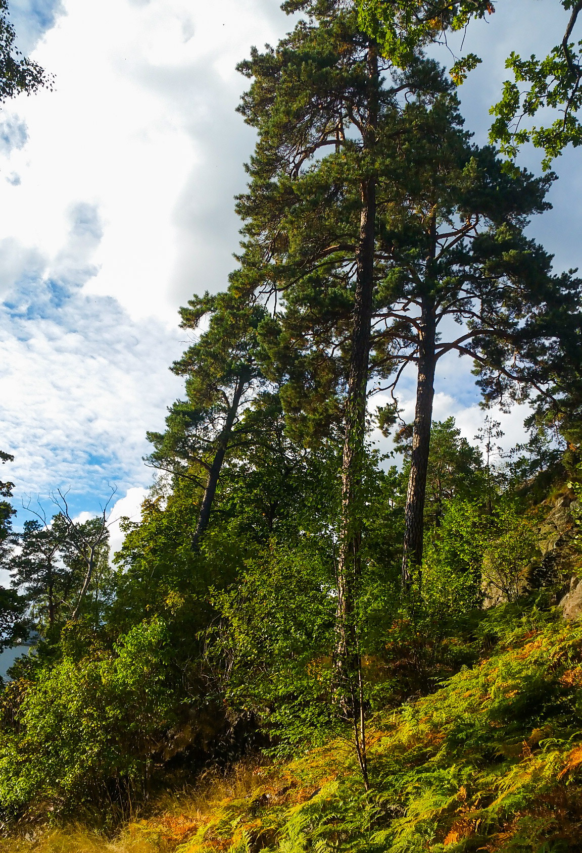 Mycket höga gammeltallar i sluttningen mellan Skatberget och Finnboda